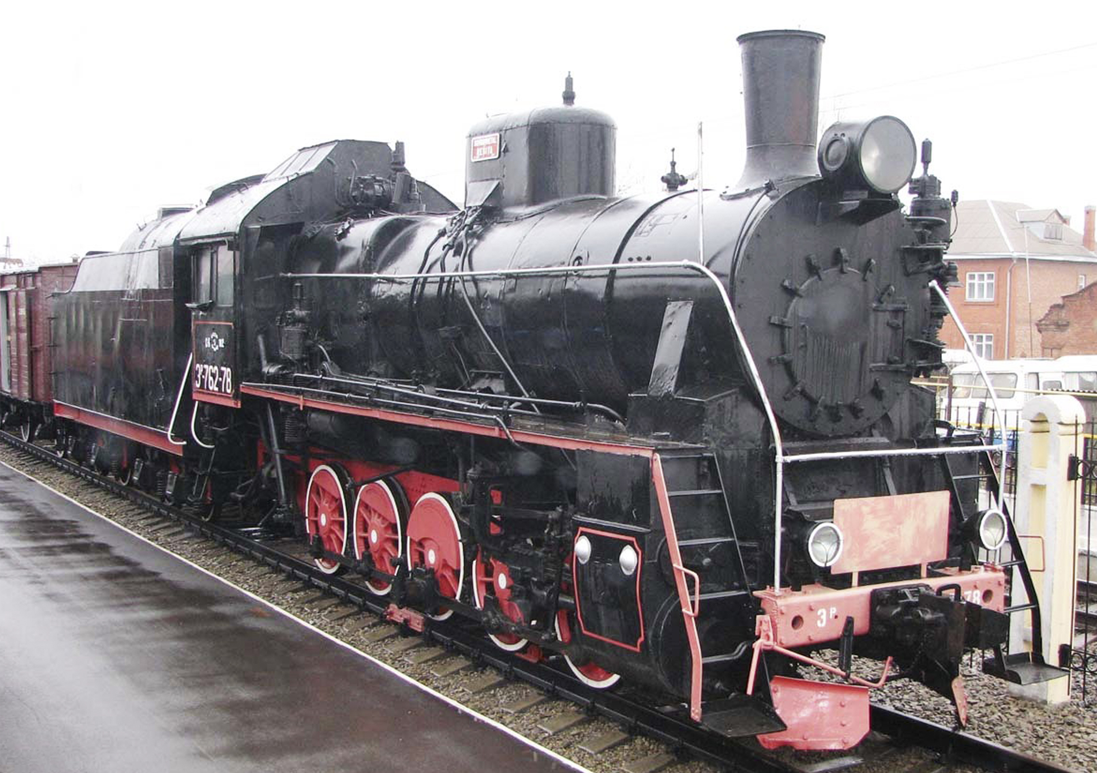 Паровоз построен в 1951 году заводом РЕШИЦА, Румыния